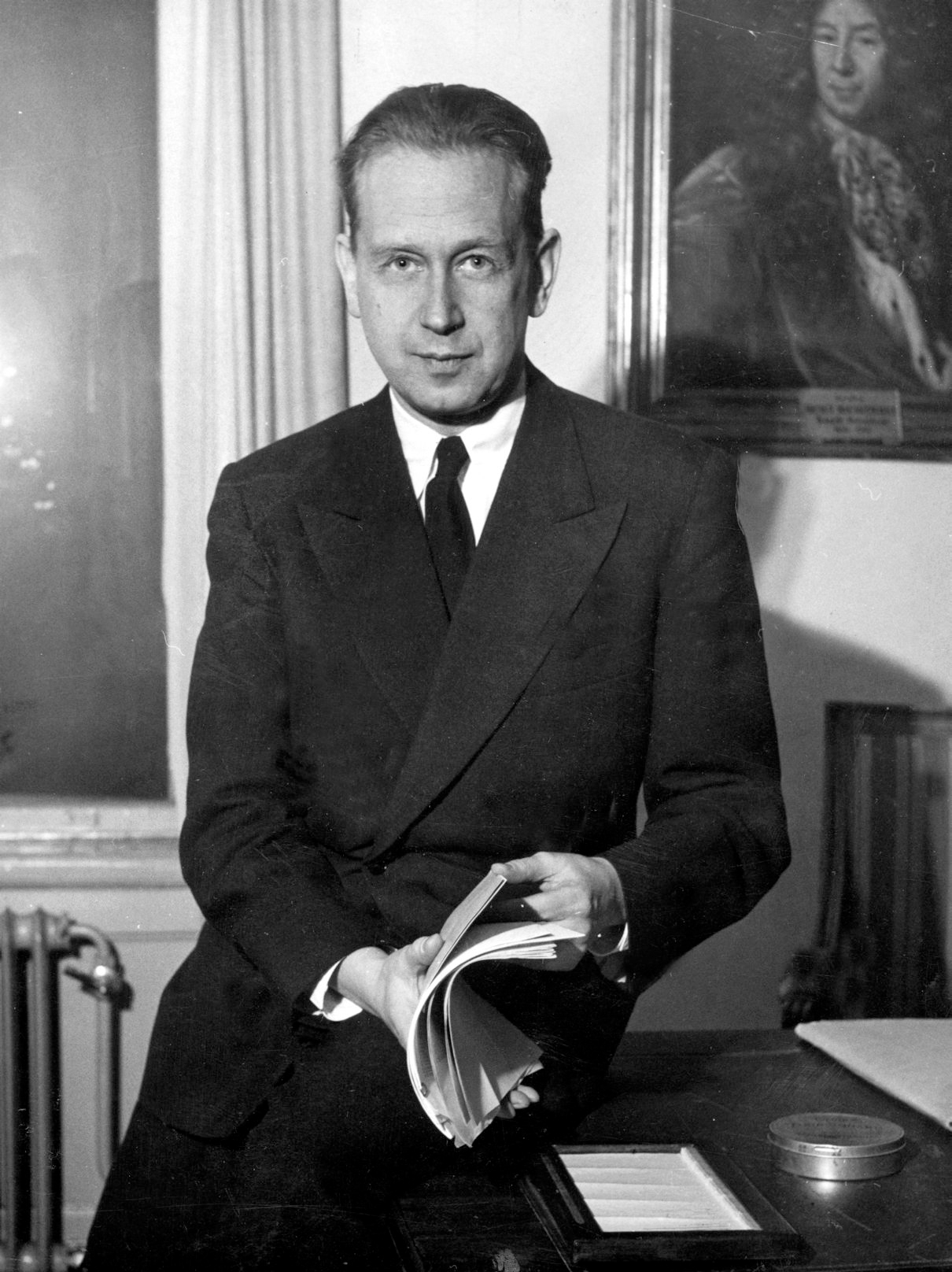 Dag Hammarskjöld (1905-1961)